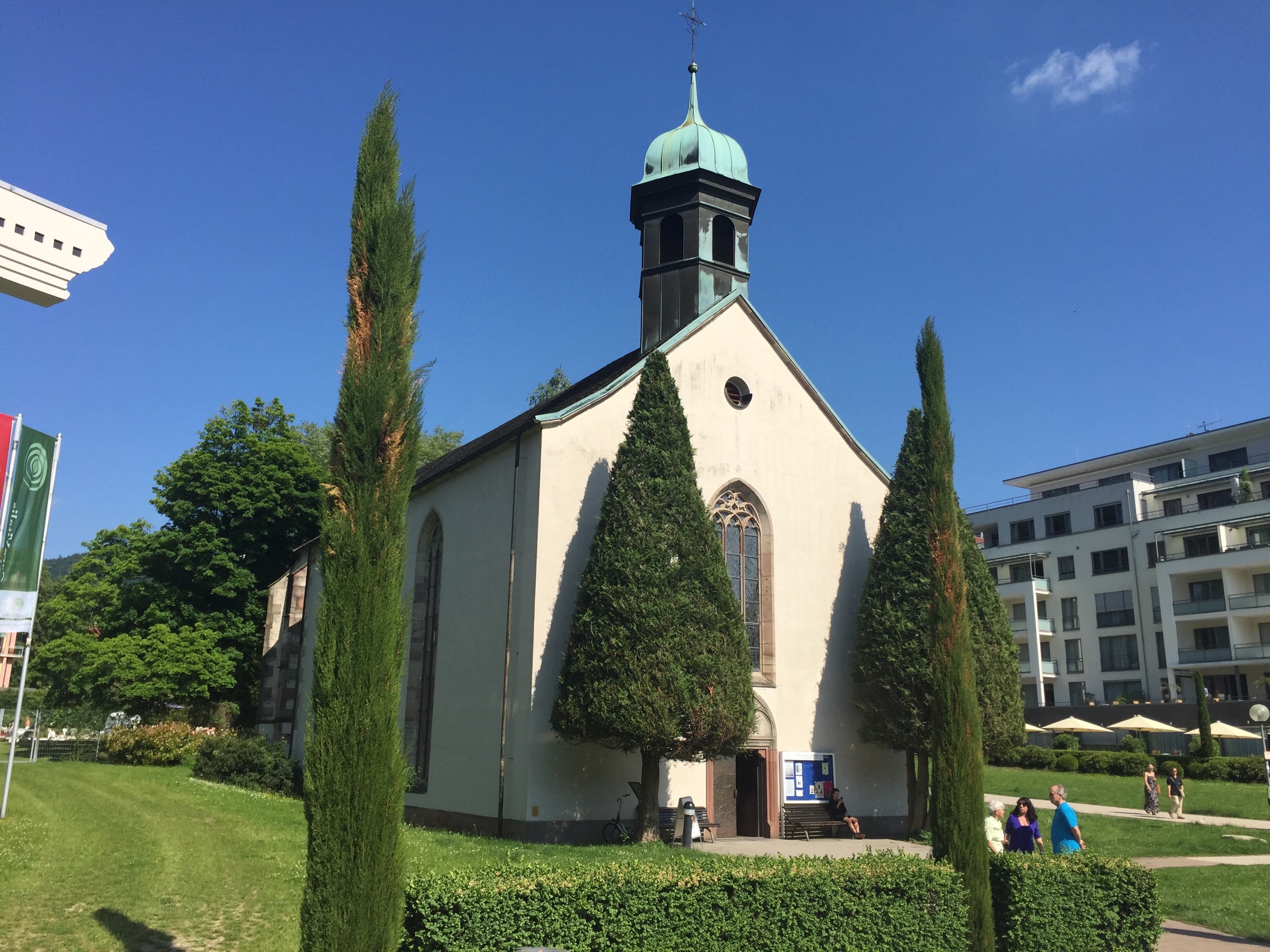 altkatholische Spitalkirche in Baden-Baden